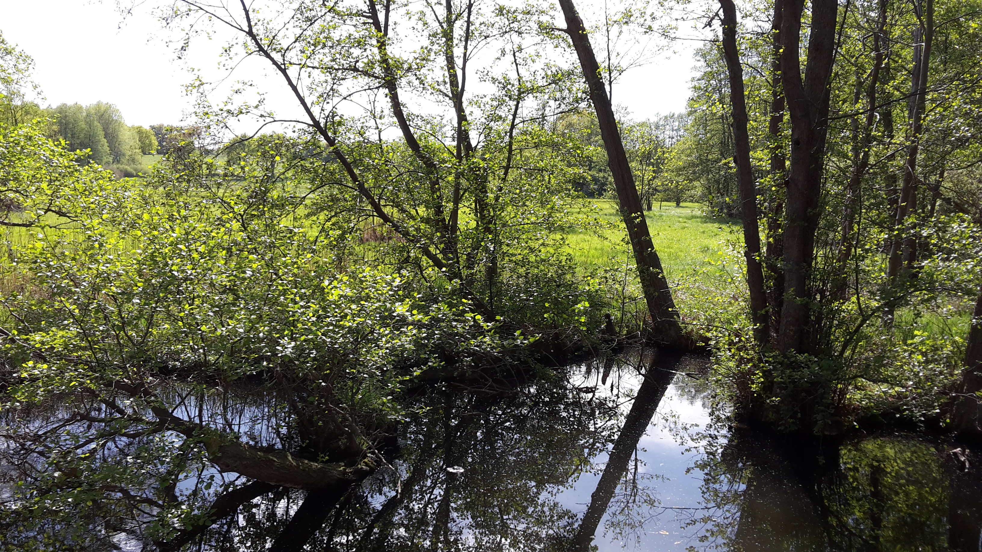 Flusslandschaft zwischen Lübeck und Ratzeburger See an der ehemaligen deutsch-deutschen Grenze mit urwaldartigen Erlenbrüche, lichte Laubwälder, Moorgewässer, sumpfige Wiesen, alte Binnendünen und Trockenrasen. Blick Richtung Westen.